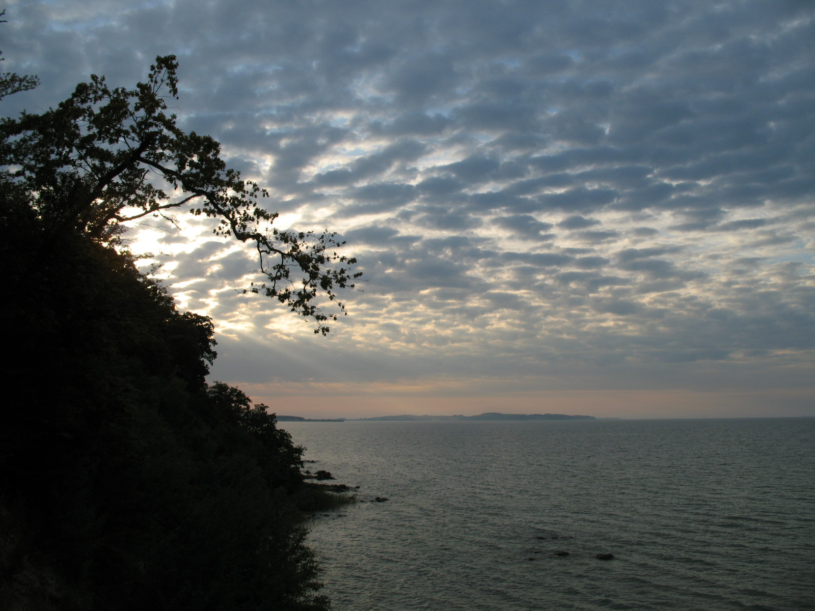 Blick in der Morgendämmerung vom großen Vilm Richtung Rügen